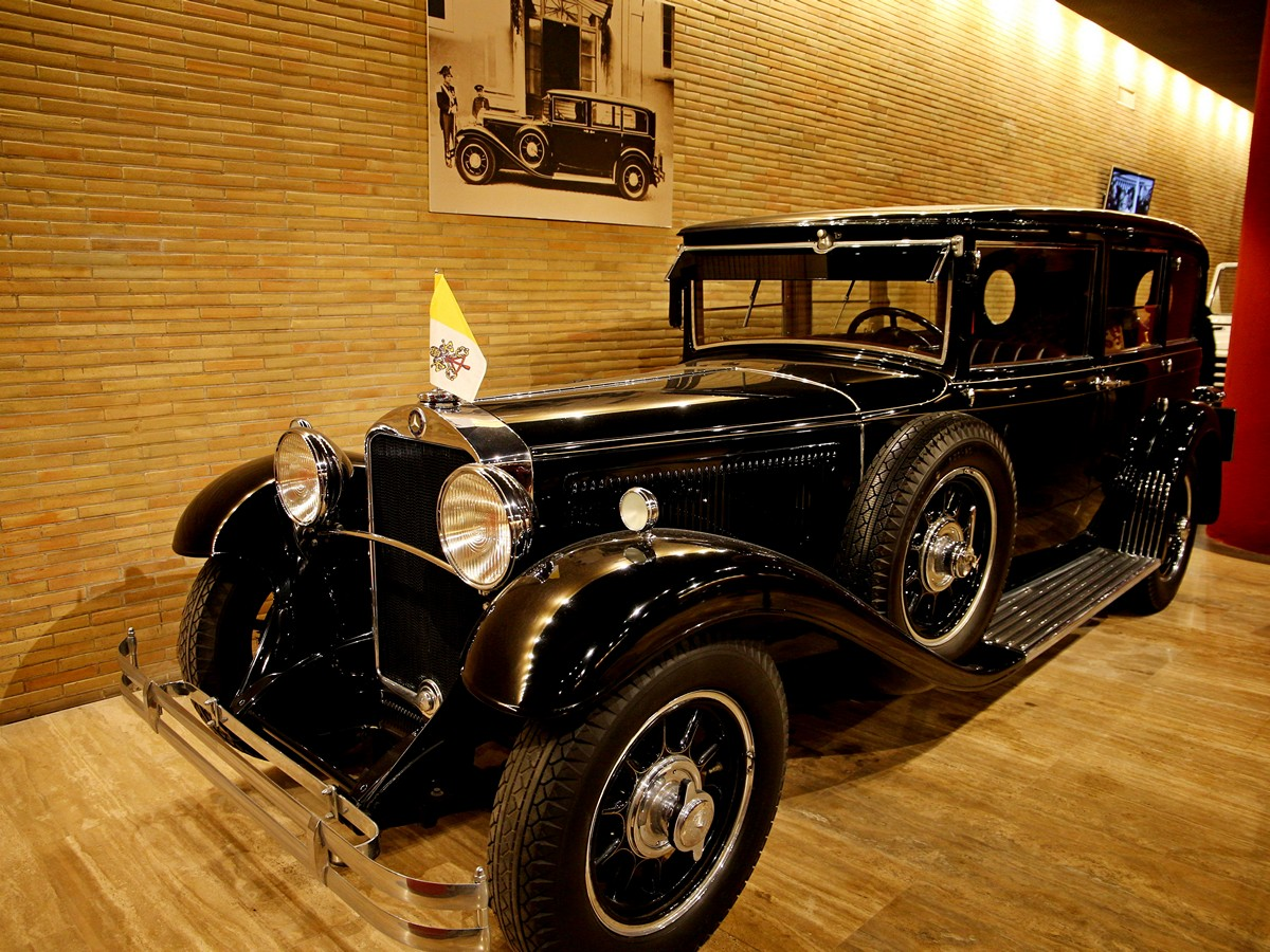 Papamobil Mercedes-Benz Typ Nürburg 460 in den Vatikanischen Museen